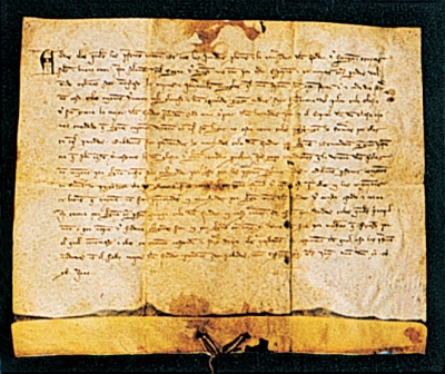 Bula de Inocencio III protegiendo a El Pilar